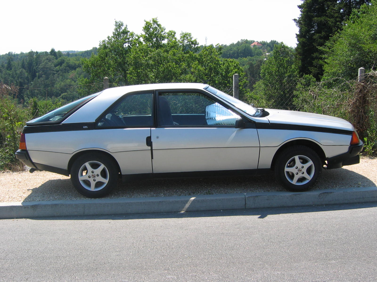 Renault Fuego Picture : Gérard Delafond